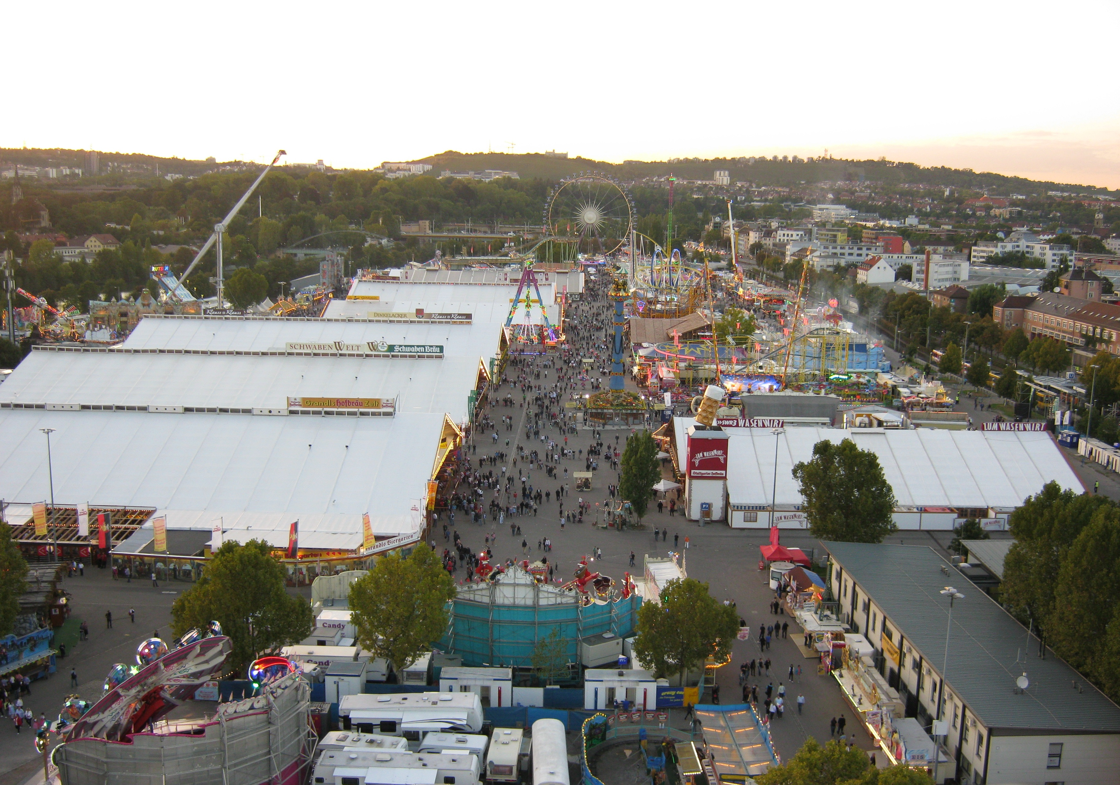 Cannstatter Volksfest 2012 fotografiert vom 55 Meter Riesenrad - OpenStreetMap(Info)